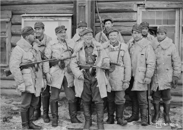 Viljo Suokkaan partio juuri vihollispuolelta palanneenna Porajärvi-Soutjärvi-Juustjärvi alueelle suoritetulta hävitysretkeltä 25.10.1941